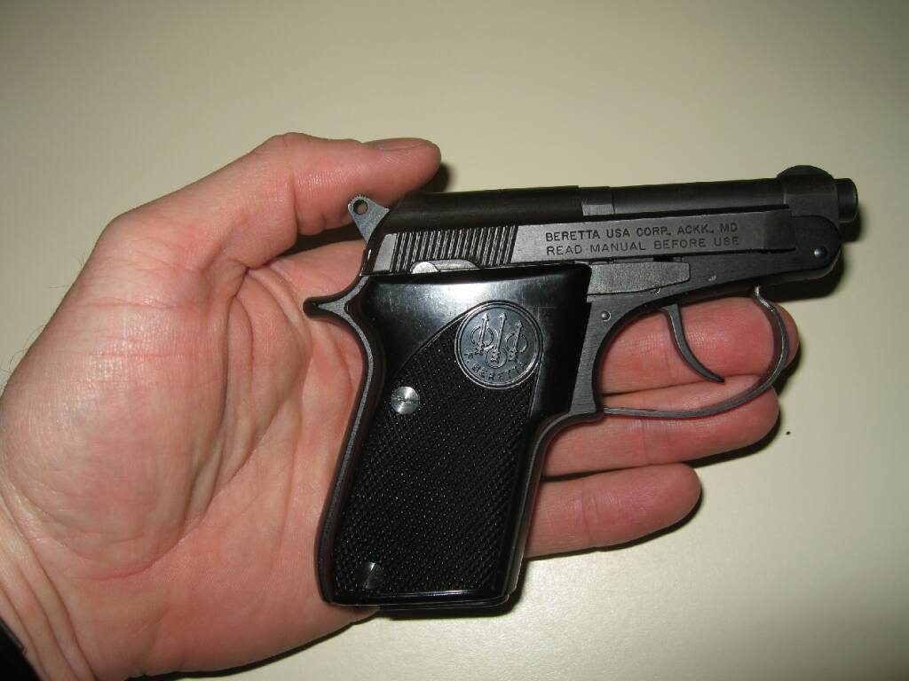 Beretta Model 21a-.25 Cal. (In hand)